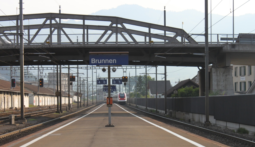 Strassenviadukt über die Gleise beim Bahnhof Brunnen